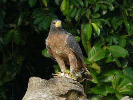 oiseau, rapace